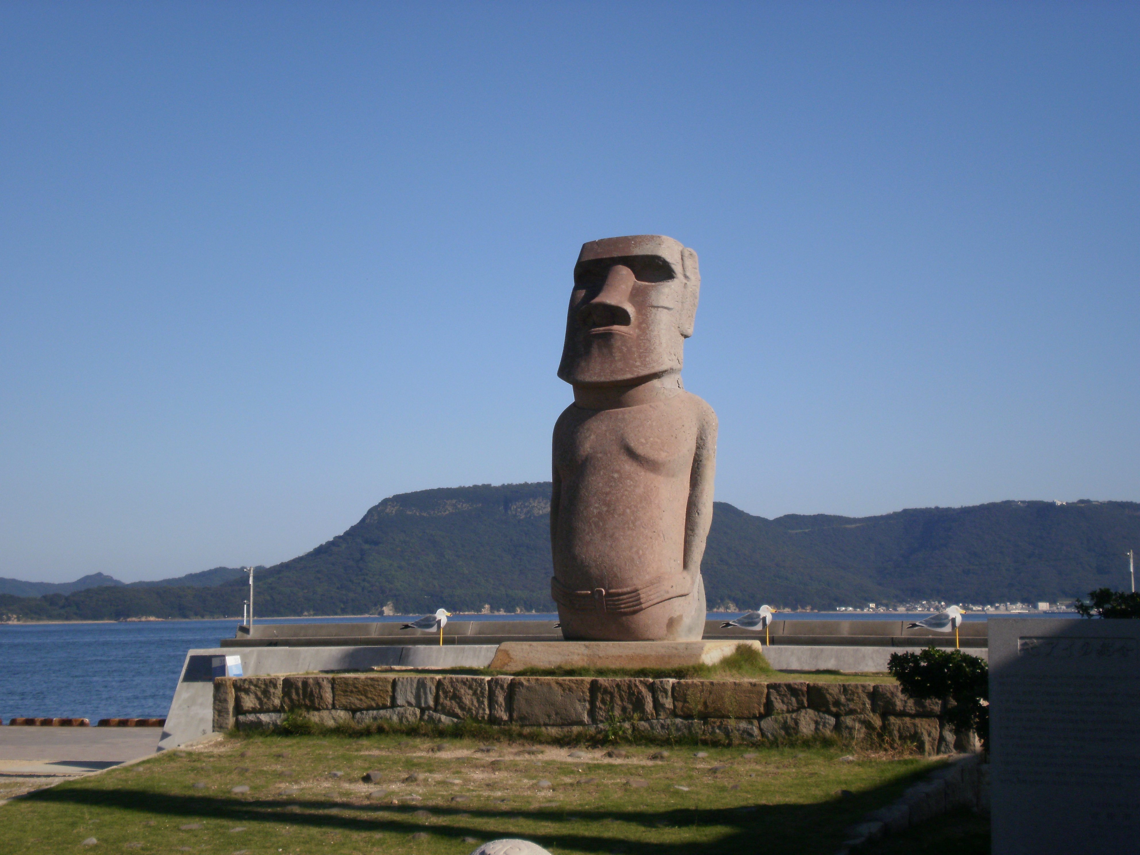 女木島 005